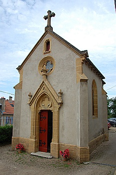 Chapelle où est enterrée Caroline COLCHEN, située devant la maison où elle est décédée, à LORRY LES METZ.